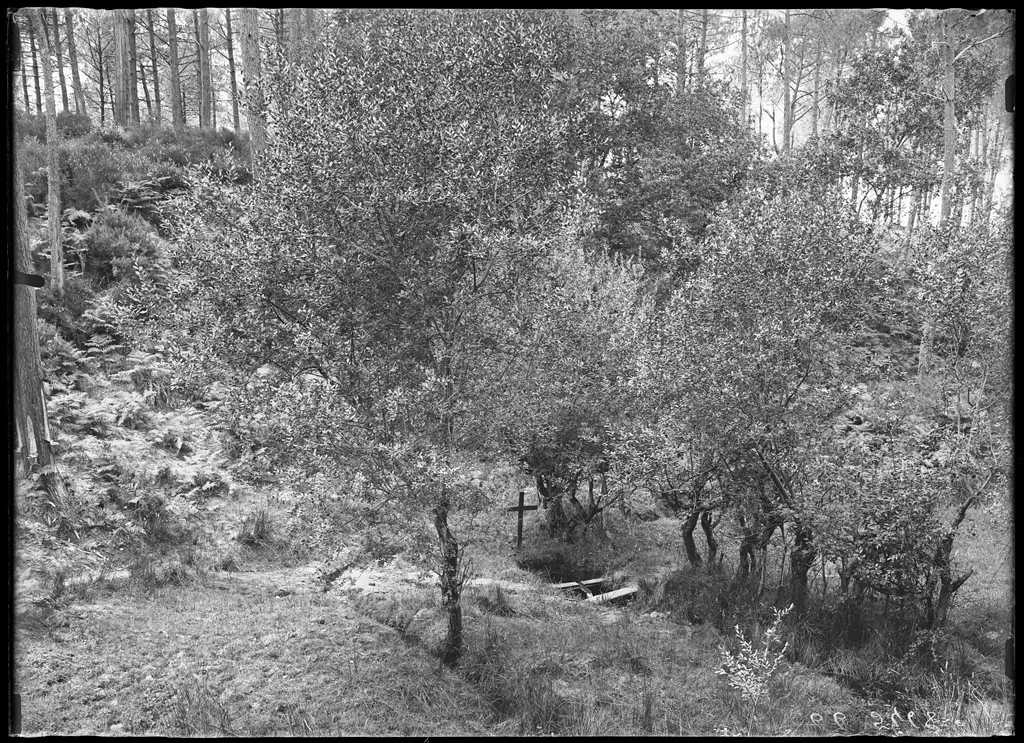 Reproduction numérique de l'œuvre Fontaine Saint-Michel, réalisée par Félix Arnaudin à Lüe le 04 août 1903 selon la technique du gélatino bromure d'argent sur plaque de verre (13 x 18 cm)